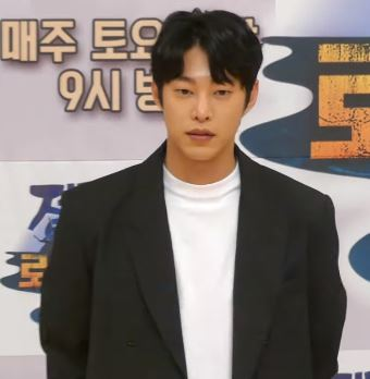 10일 오후 서울시 양천구 목동 SBS에서 '정글의 법칙 in 로스트 정글 & 아일랜드' 기자간담회 열려 후반전 로스트 아일랜드 출연자인 송원석, 이열음, 아이콘 비아이, 레드벨벳 예리가 참석했다.